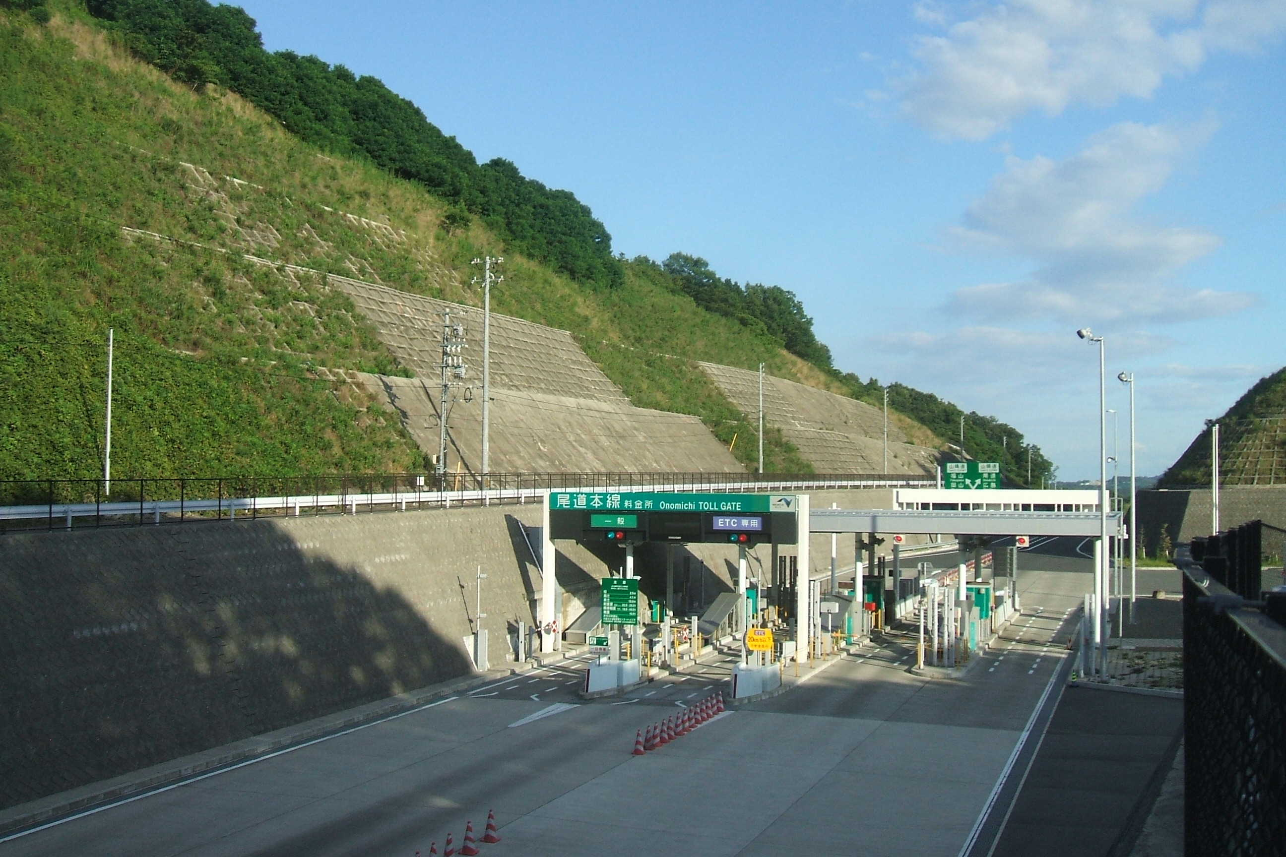 広島県尾道市にある尾道自動車道の料金所を北側より撮影